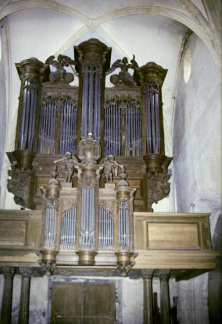 Mitry-Mory, (Seine-et-Marne, France), église Saint Martin, dans un buffet érigé par le menuisier-sculpteur ordinaire des bâtiments du Roi Germain Pilon de 1641 à 1646, l'installation d'un orgue est débutée en 1641 par Louis & Jehan de Héman, et achevée en 1651 par Pierre Desenclos & Jacques Lefebvre; l'instrument est restauré par François-Henri Clicquot en 1750, reconstruit par François Dallery en 1813, puis par Joseph Merklin en 1876; il est restauré par Théo Haerpfer en 1981.